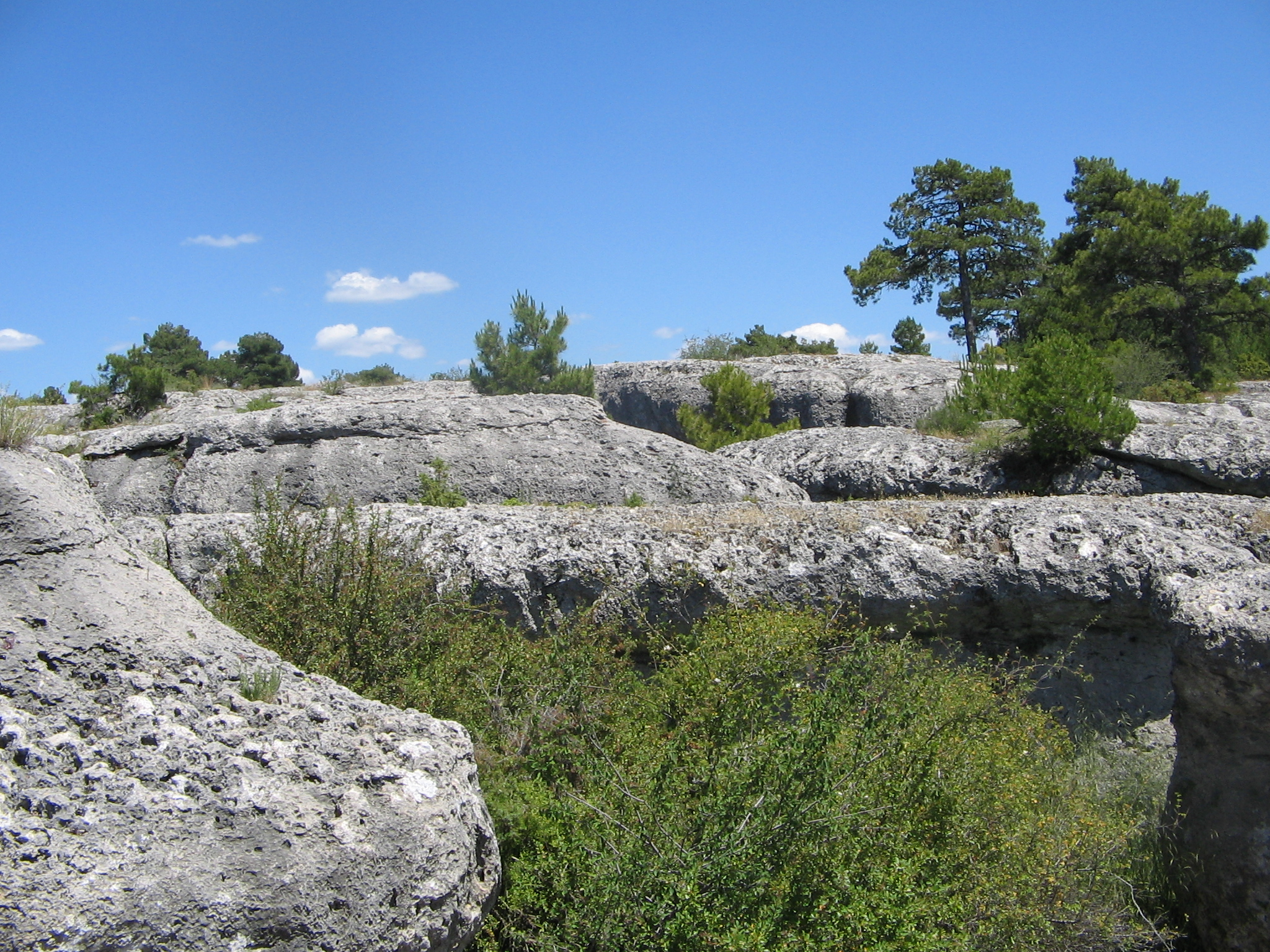 Parc de la Ciudad encantada (Provincia de Cuenca)